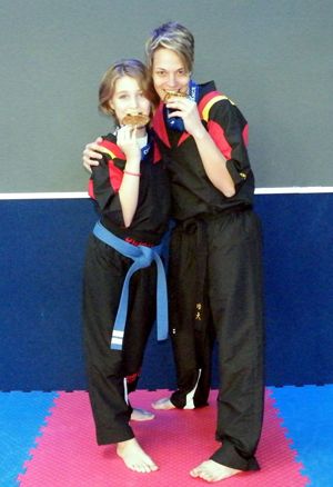 Andrea Schnell nach der Weltmeisterschaft 2012 in Paris, Frankreich